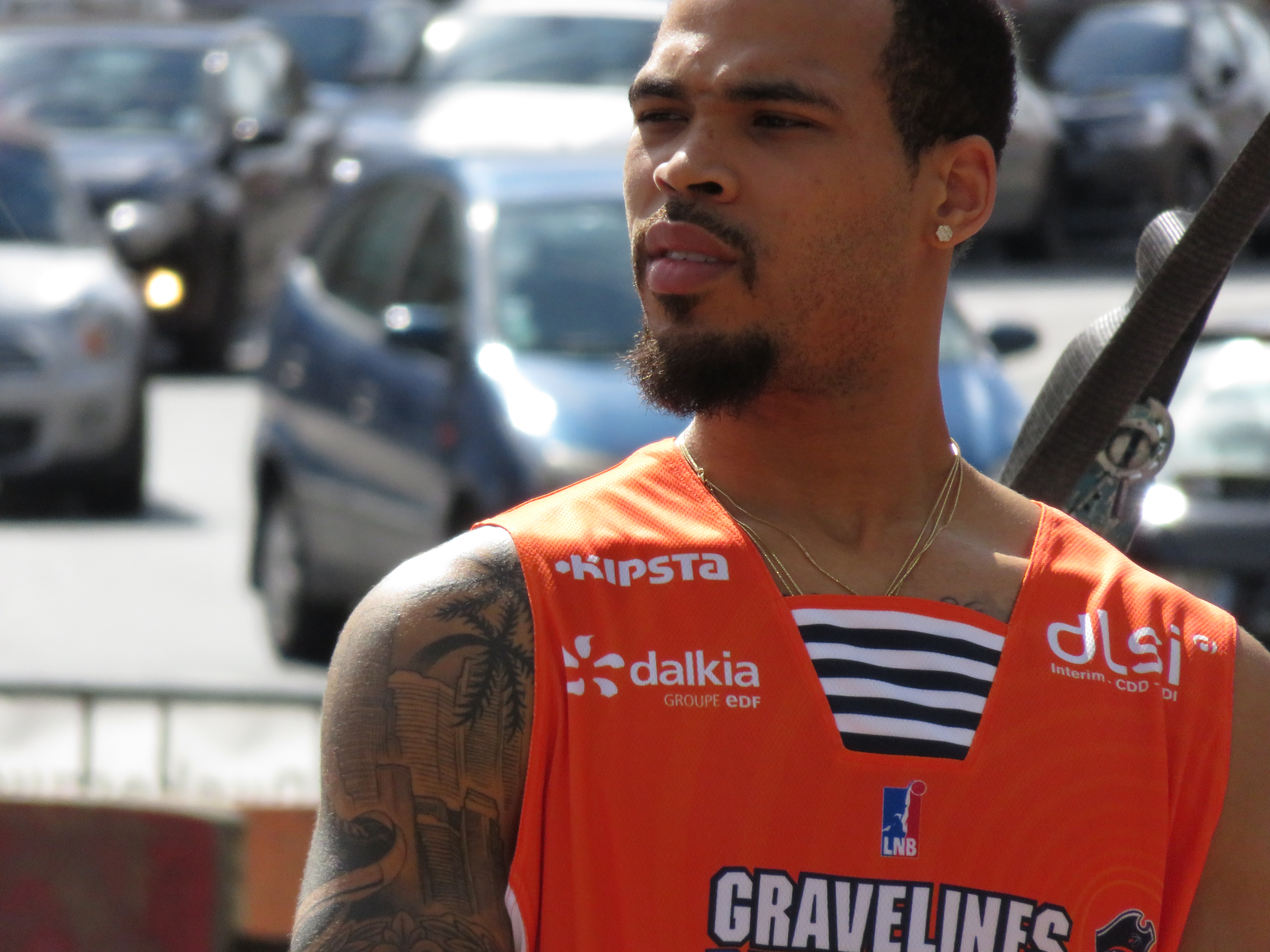 1 Justin Cobbs